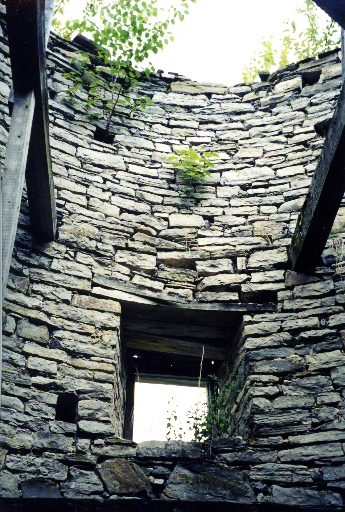 Intérieur du Moulin à vent de Sainte-Famille , aussi connu sous le nom de Moulin Poulin, situé à l'Île d'Orléans (Capitale nationale, Québec). Moulin à farine.